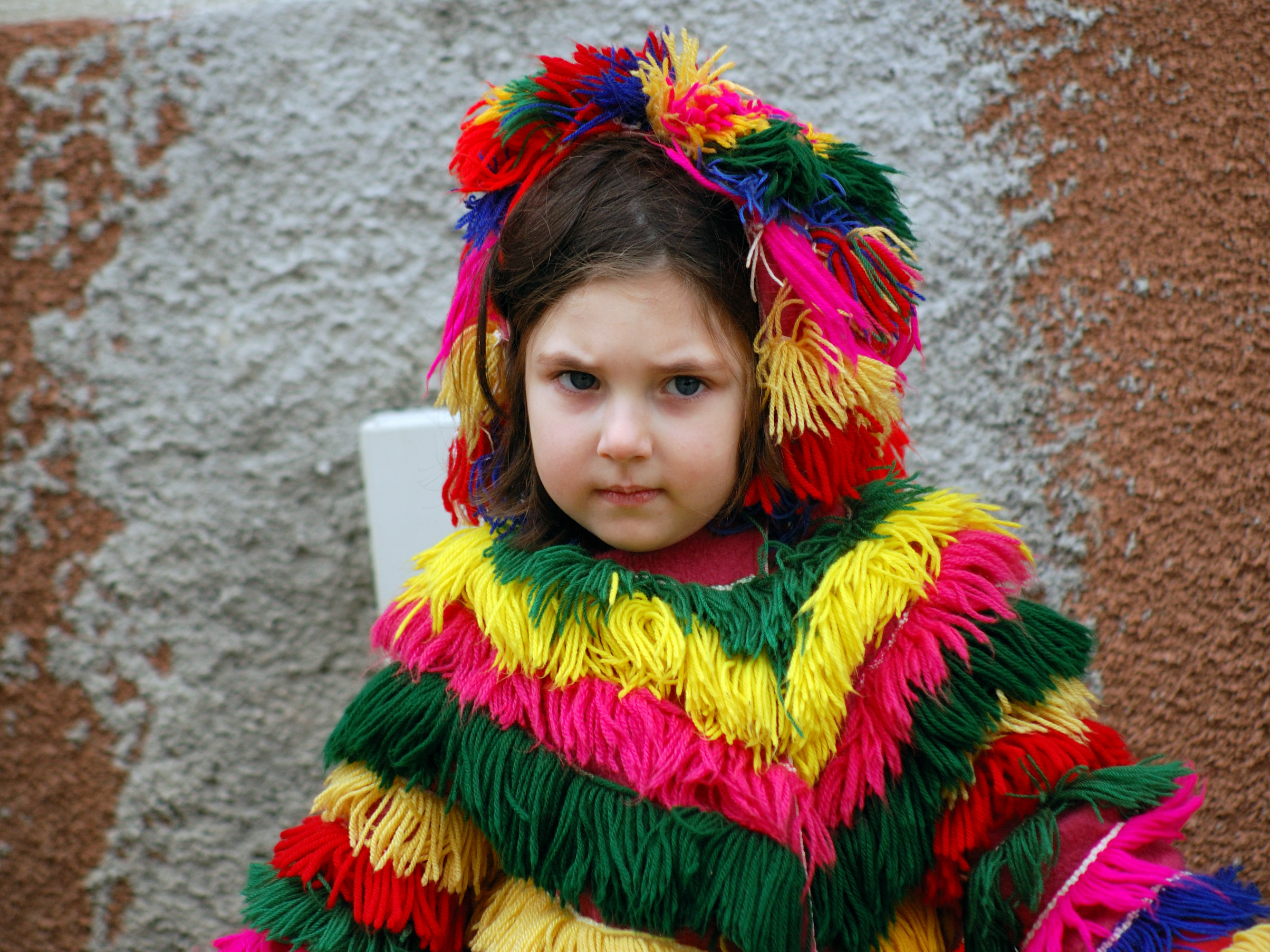 Carnaval de Podence, Portugal [2008]